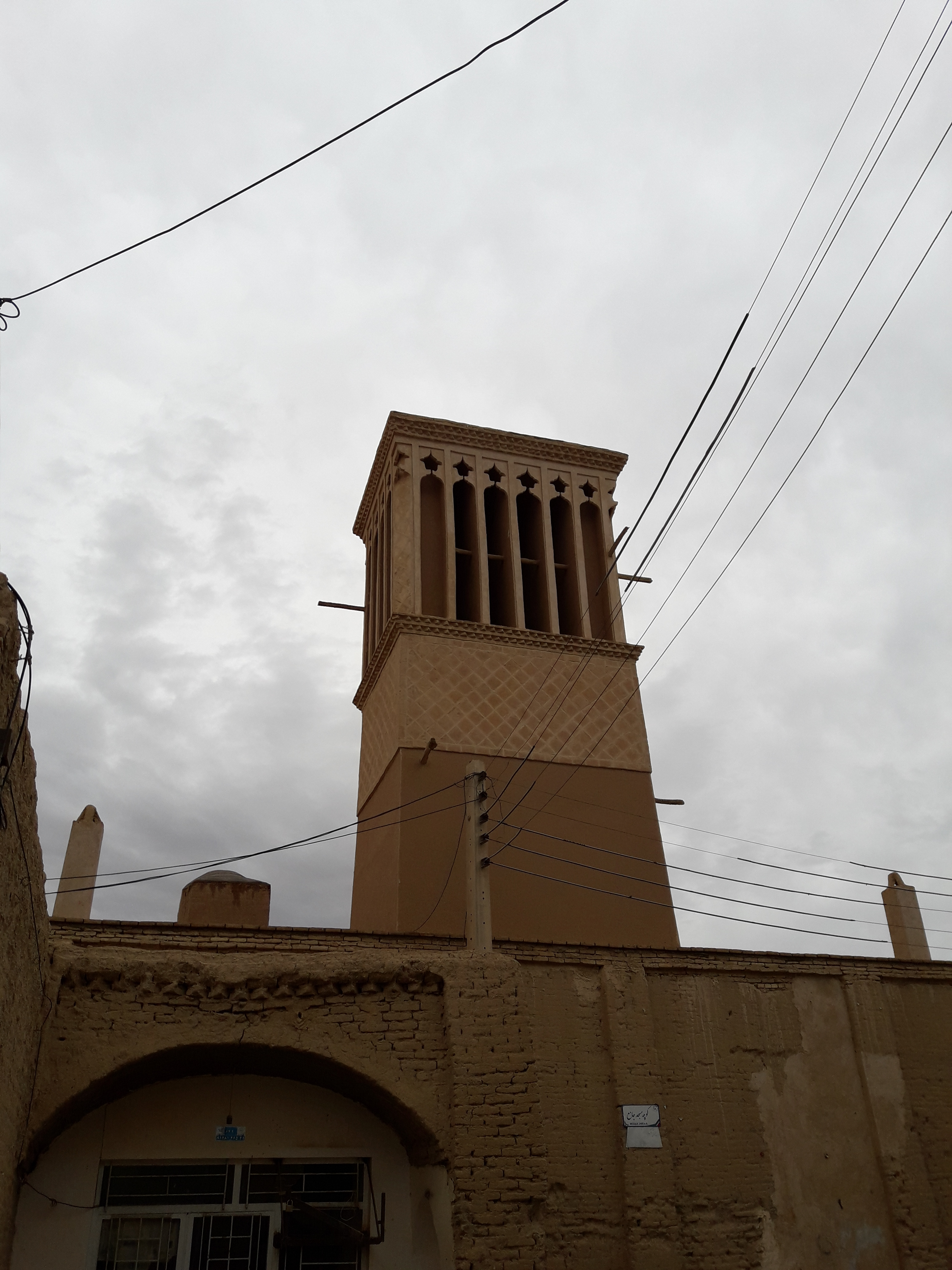 بادگیر اسفنداران...amh12es